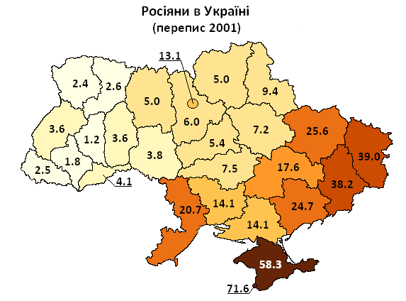 Розселення росіян в Україні за переписом 2001 р. / Russians in Ukraine, 2001 census